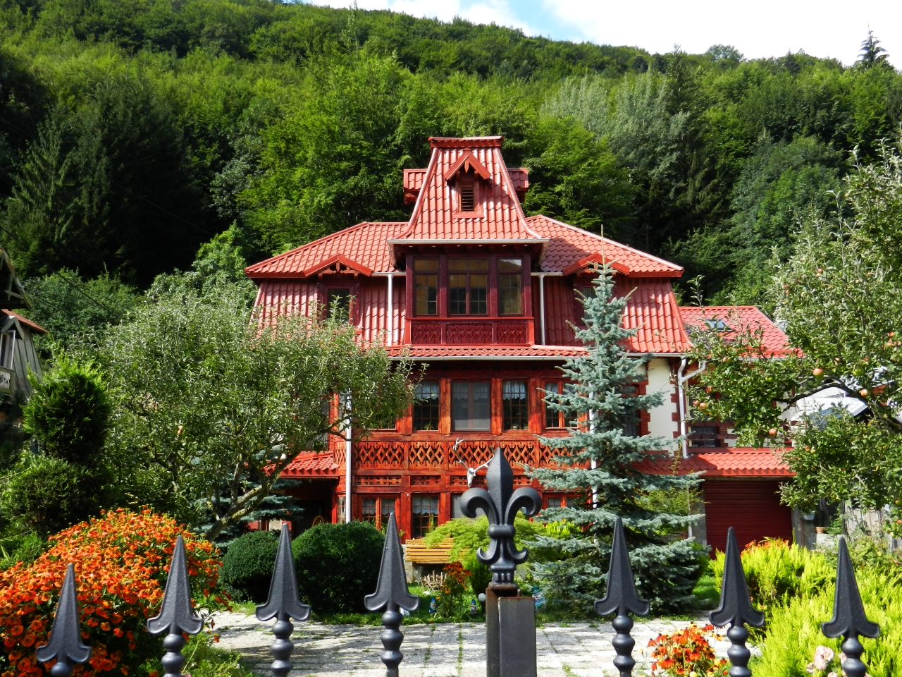 Casa Cornelia Coman